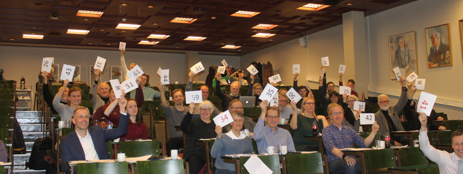 Medlemmer i Åpen Folkekirke på årsmøtet i 2019